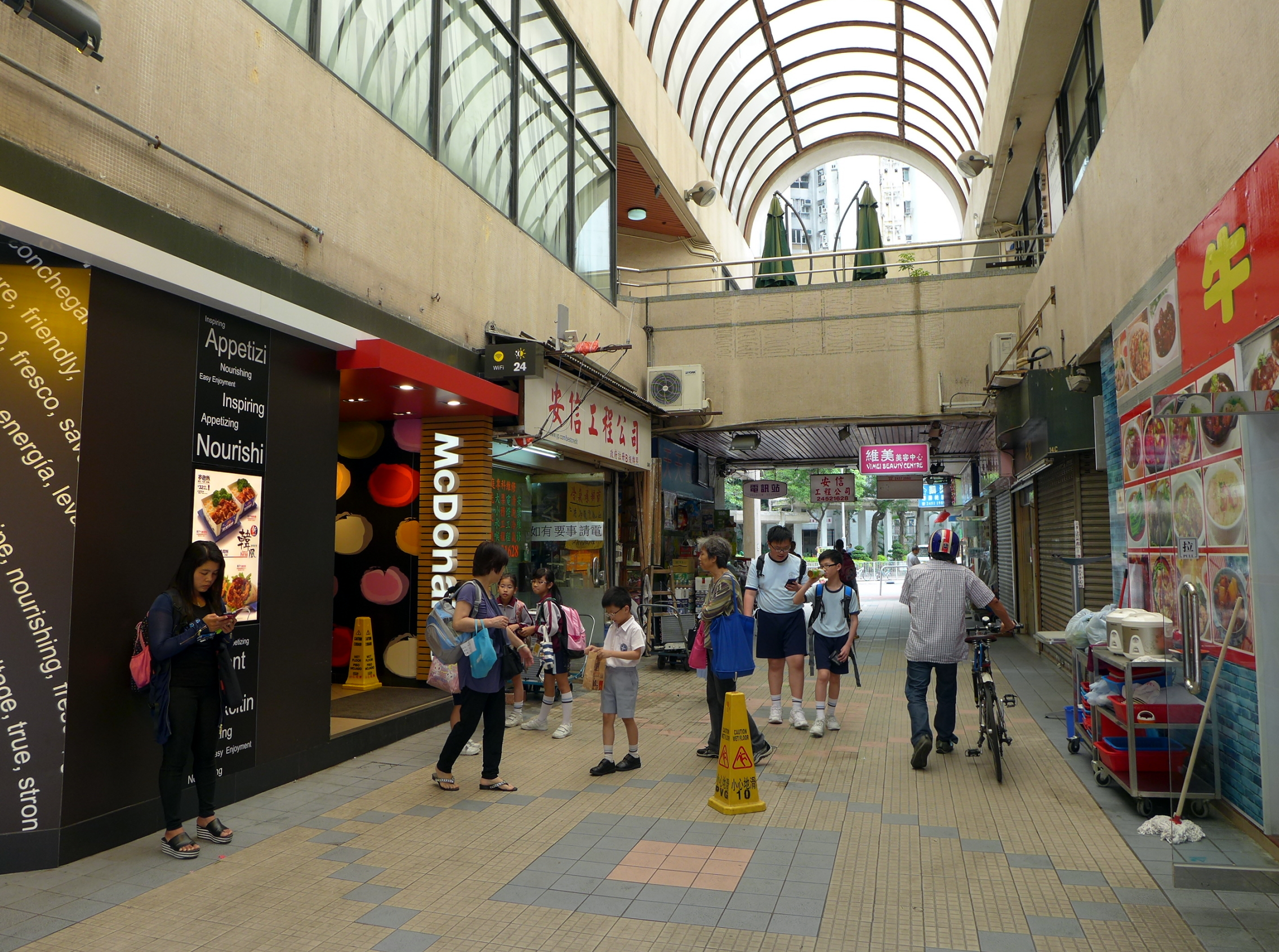 Prine View Garden Shopping Arcade